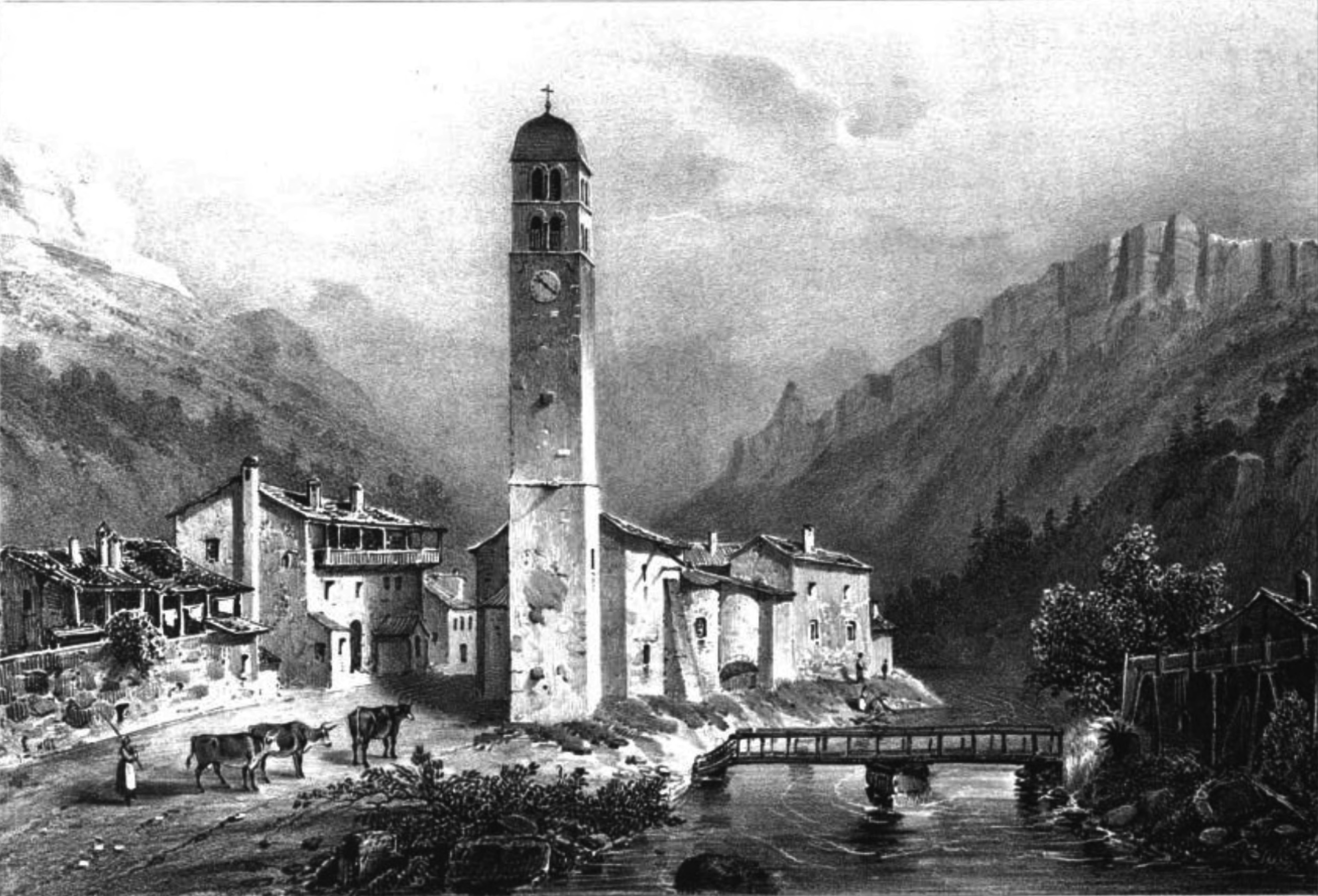 Album du Dauphiné - tome III, litographie du Casset (Hautes-Alpes)